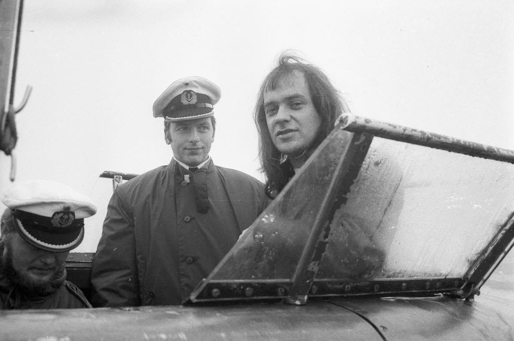 Udo Lindenberg (rechts) begrüßt auf der Scharnhorstbrücke die Crew von U 26, das mit ihm zu einem Kurztrip auf die Förde hinausfährt. Neben ihm der Kommandant, Kapitänleutnant Hartmut Manseck.